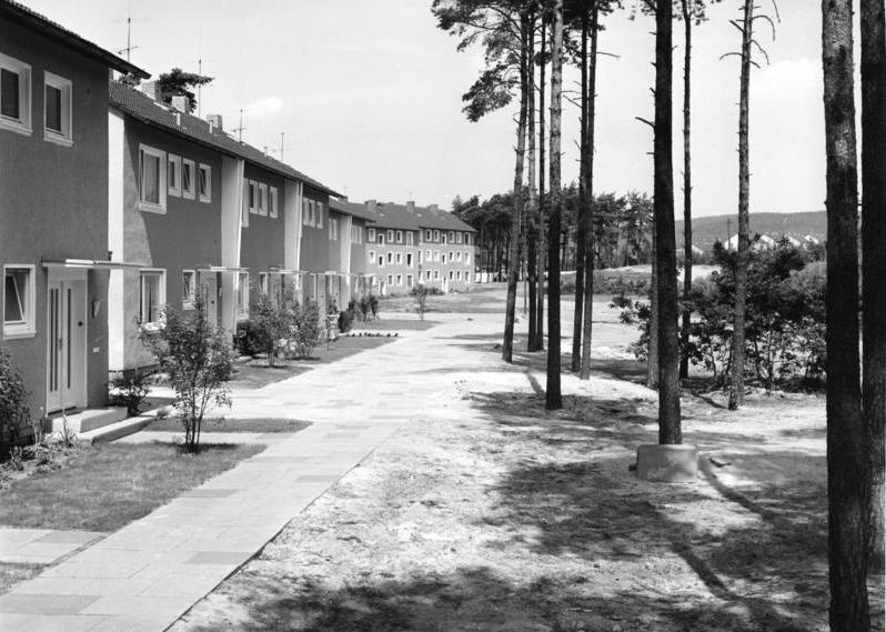 Bielefeld-Sennestadt (Nordrhein-Westfalen)